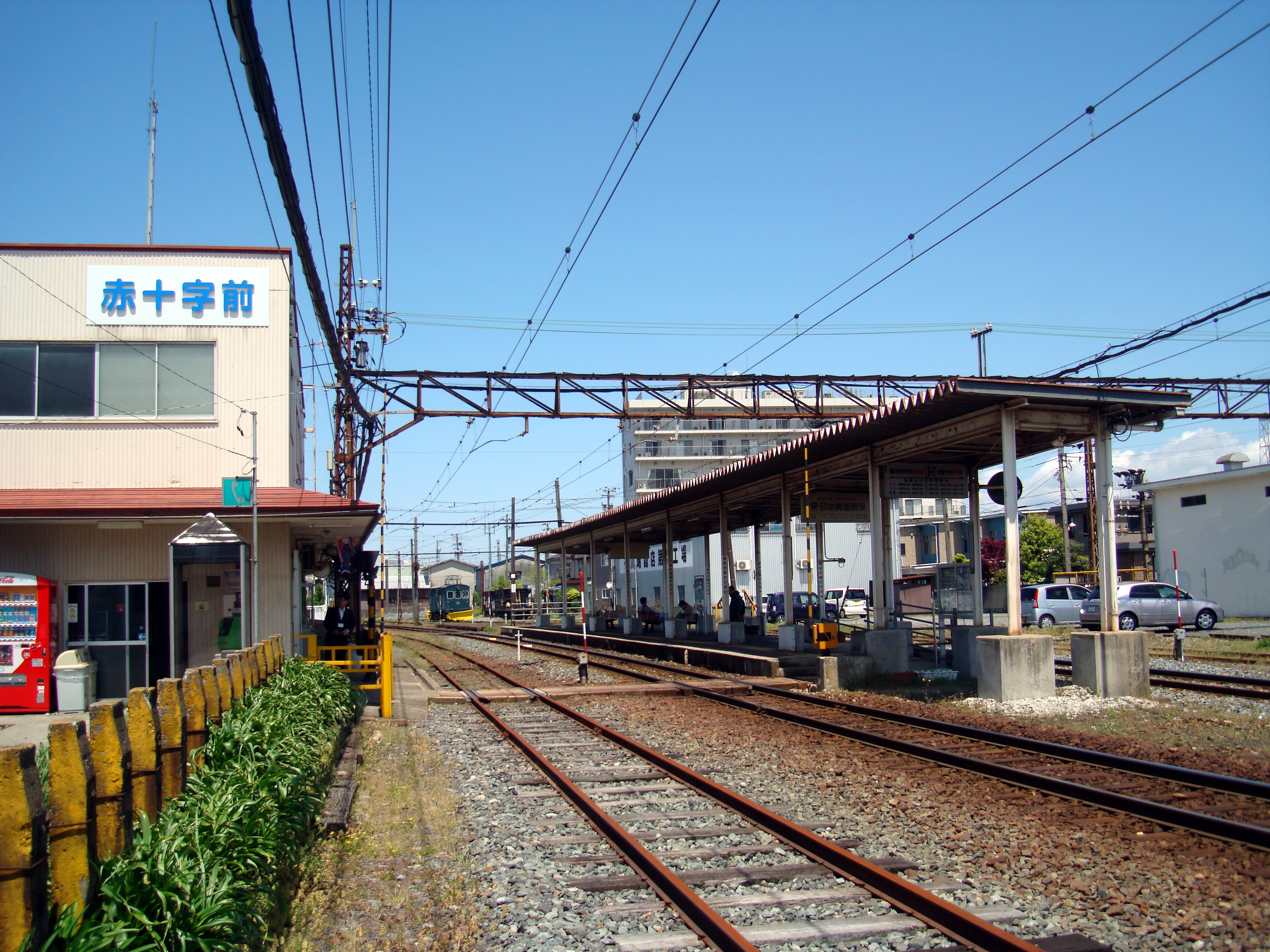 赤十字前駅